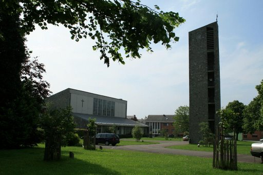 Eglise du Moulin-à-Vent